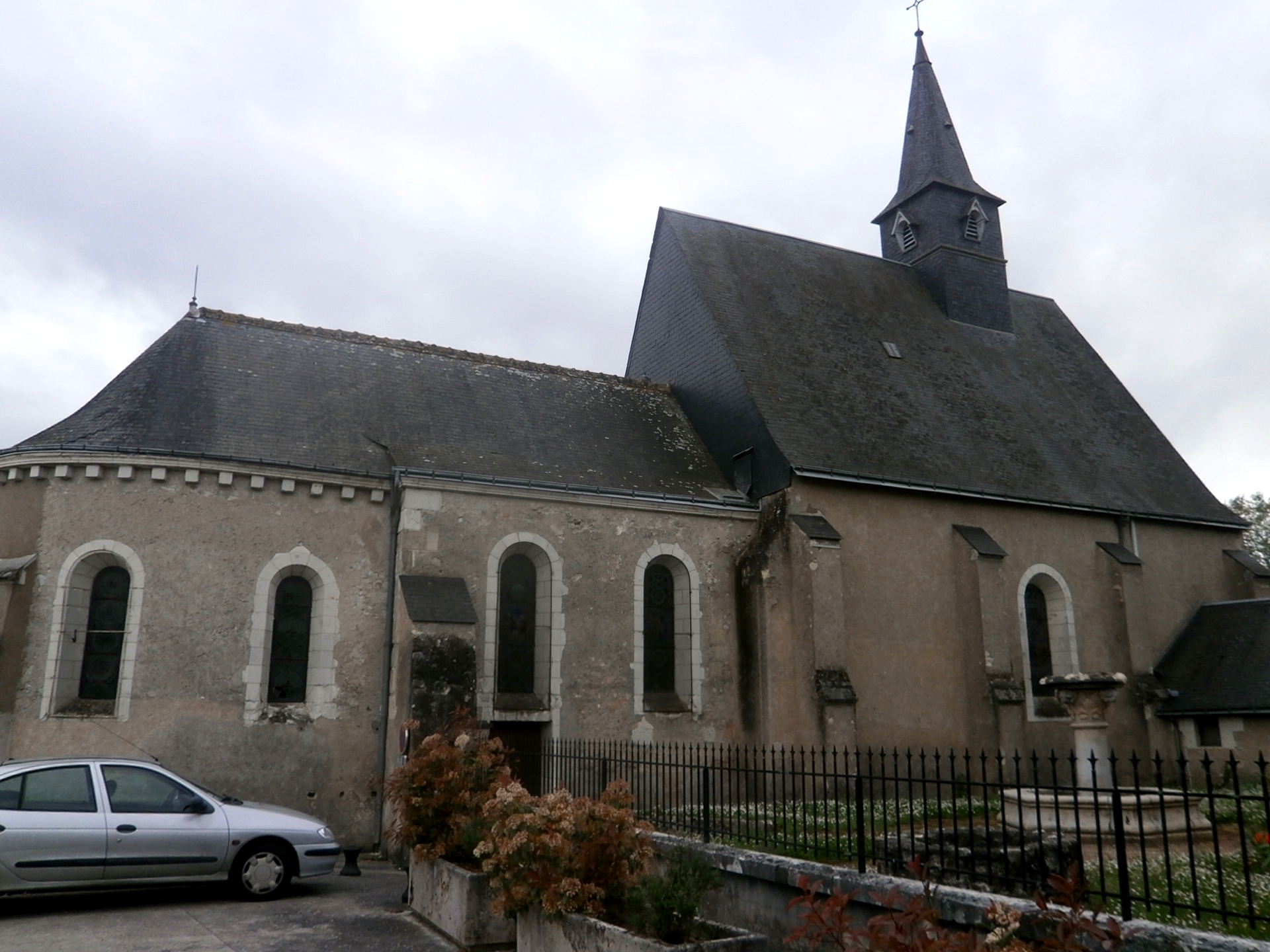 L'église de Notre-Dame-d'Oé